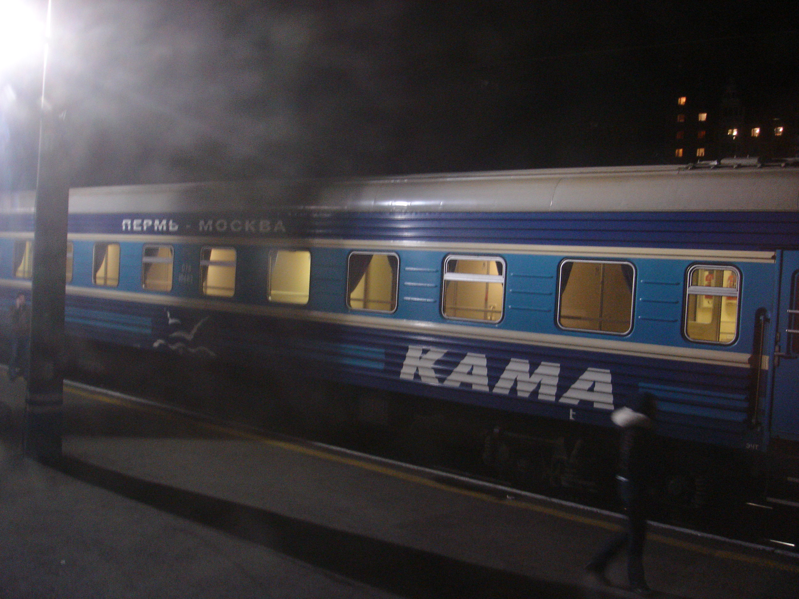 Фирменный поезд "Кама", предположительно, вагон модели 61-4179.